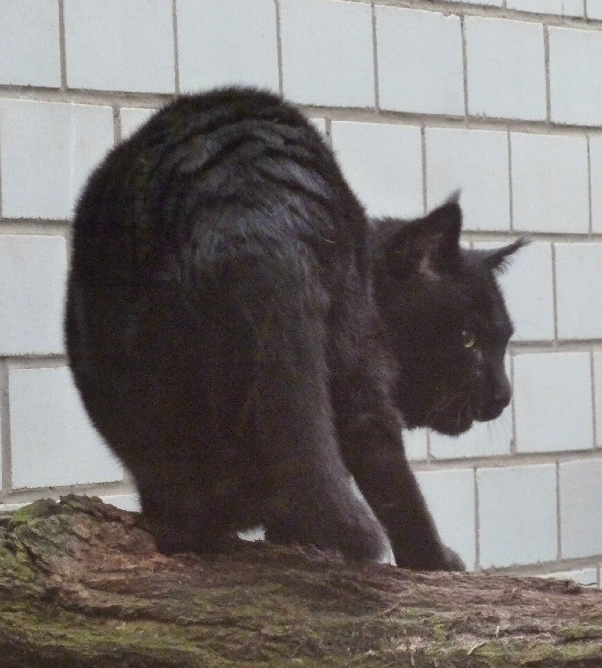 schwarzes Exemplar der Rohrkatze im Heidelberger Zoo